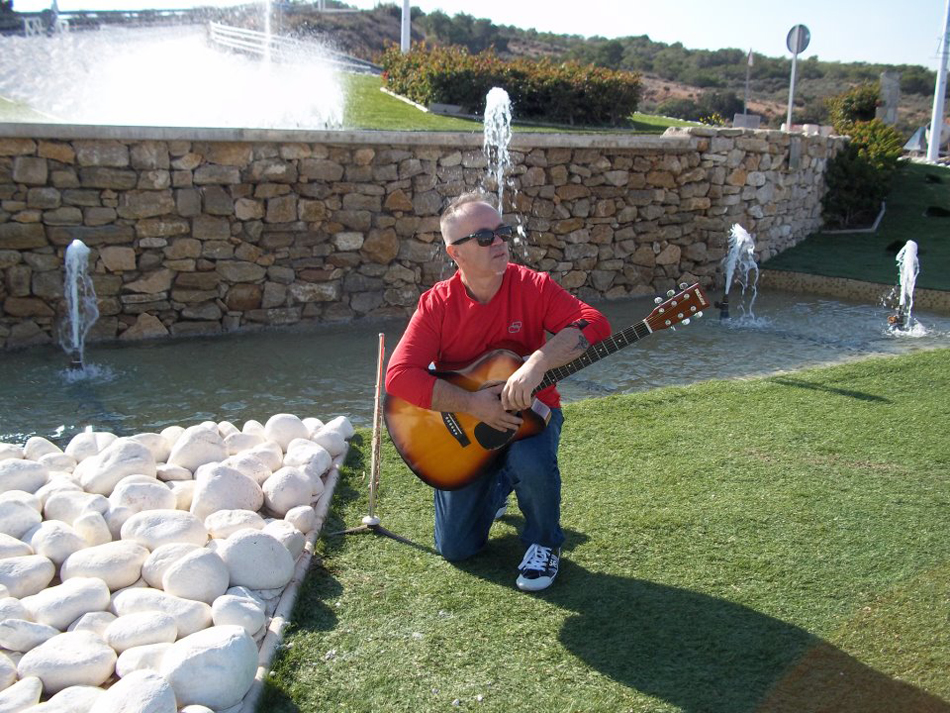 Цане Николовски 2012